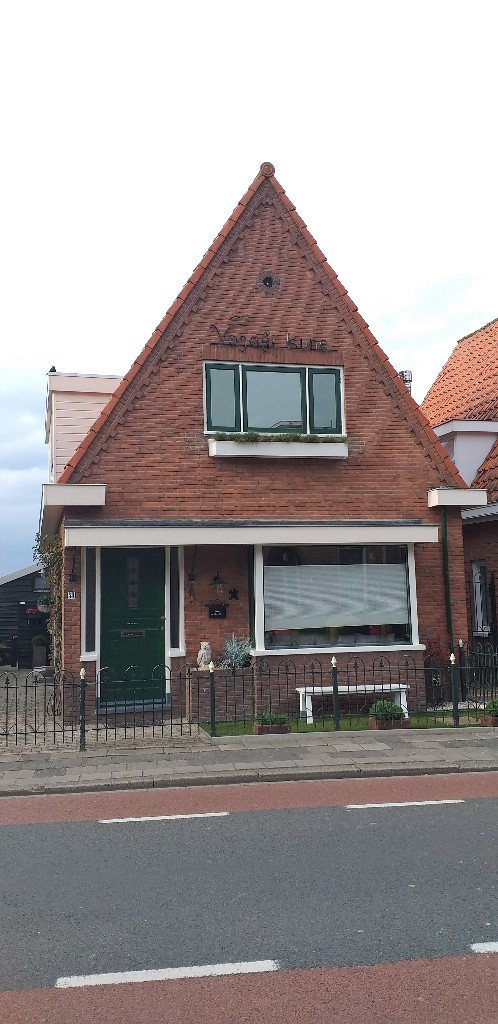 Domo en Lutjebroek Nederlando kun la nomo: Vojaĝi kune